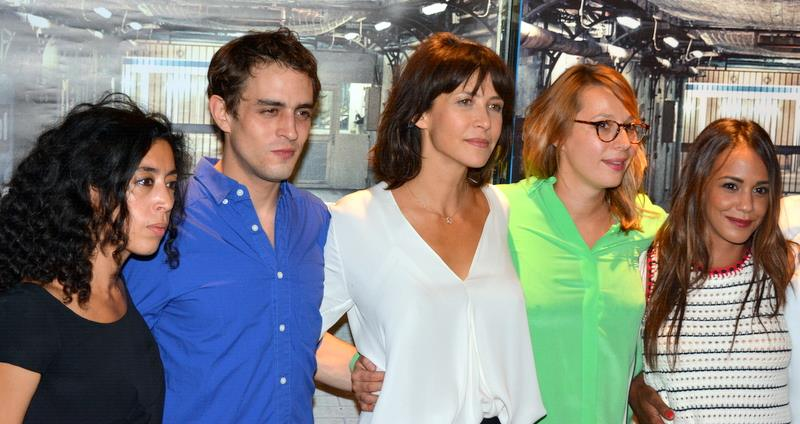 L'équipe du film "La Taularde" à une avant-première